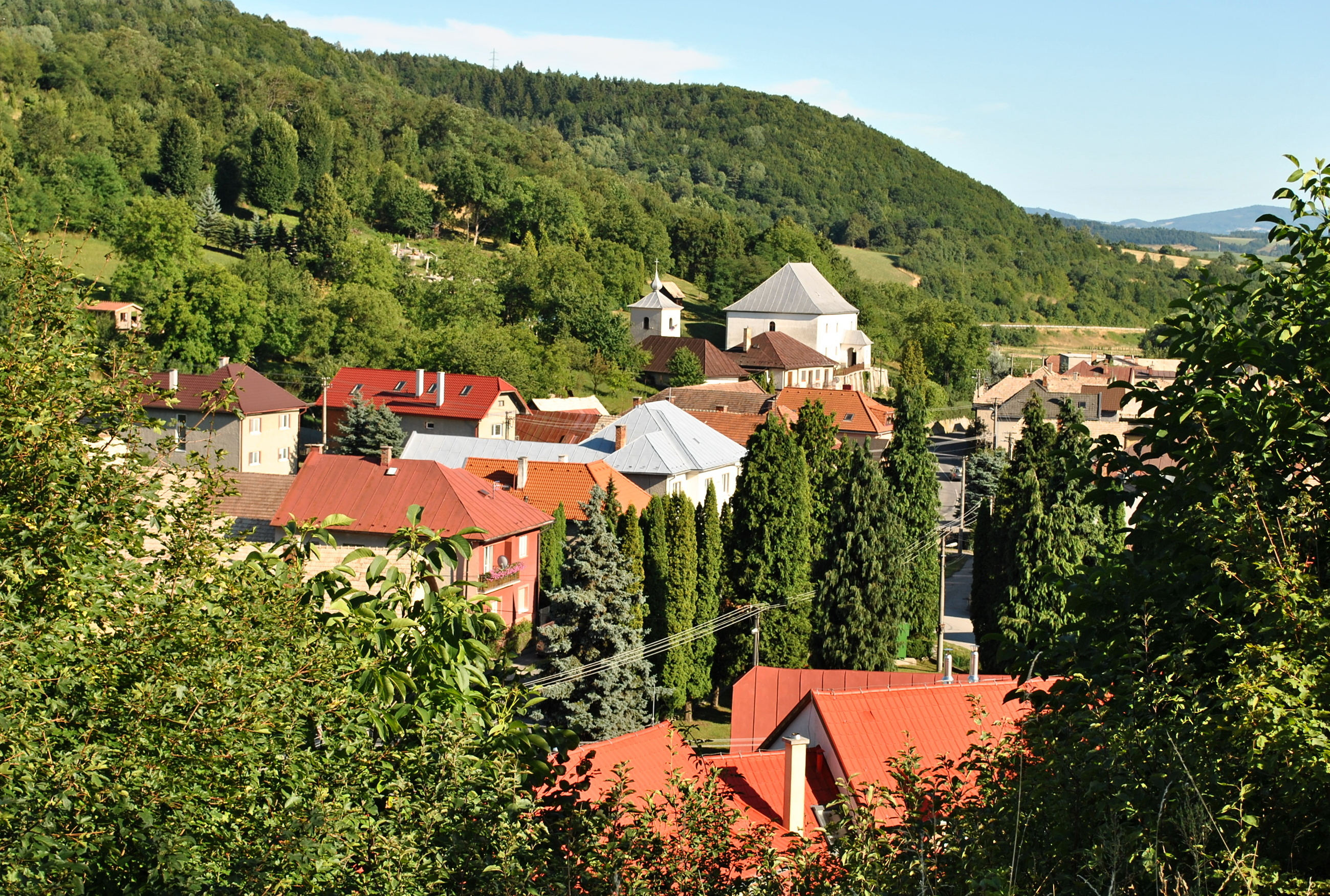 Horná Mičiná, okr. Banská Bystrica - pohľad z kostola Sv. Michala na dolnú (južnú) časť obce, v pozadí evanjelický kostol so zvonicou